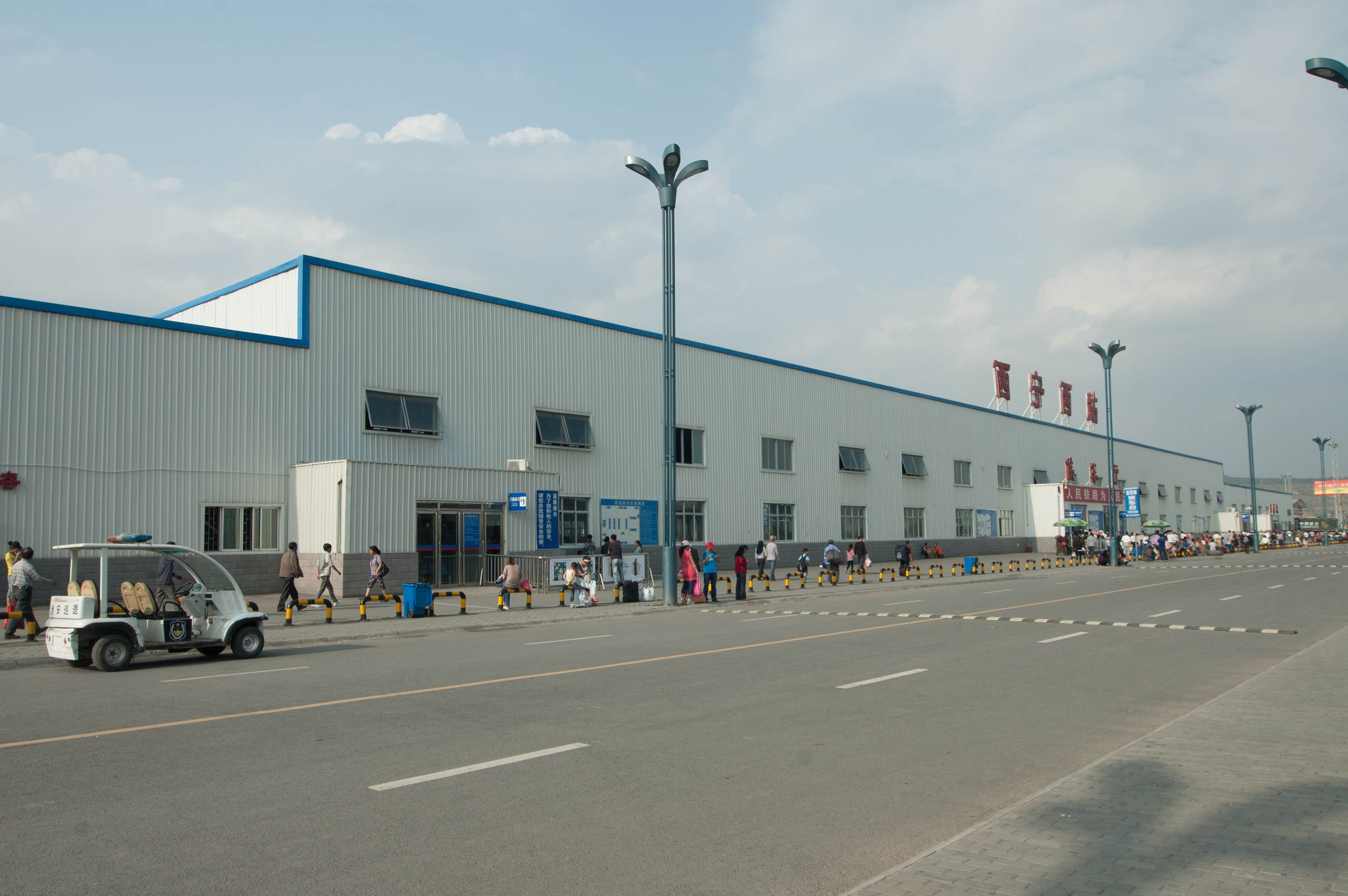 201308西宁西站